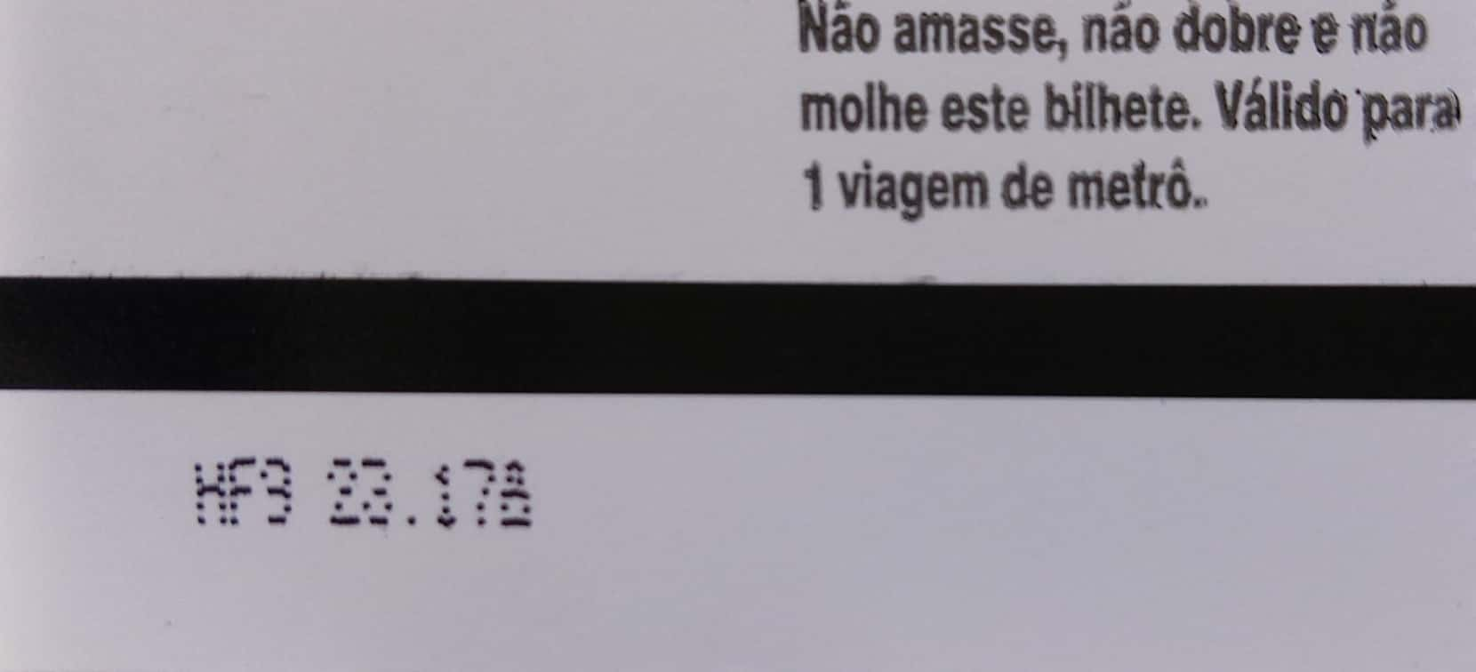 Bilhete do trem de Belo Horizonte (CBTU)